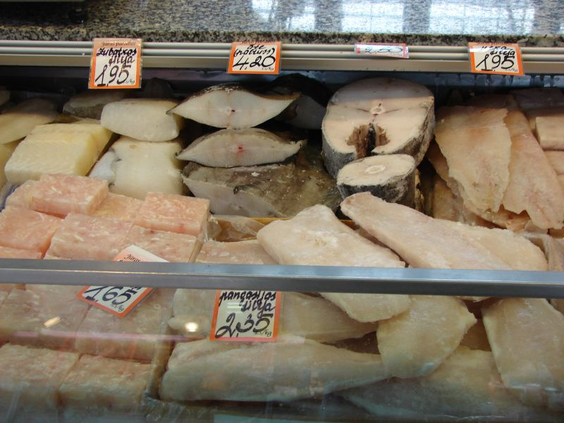 Angebot an tiefgefrorenem Fisch an einem Verkaufsstand im Zentralmarkt von Riga, Lettland.